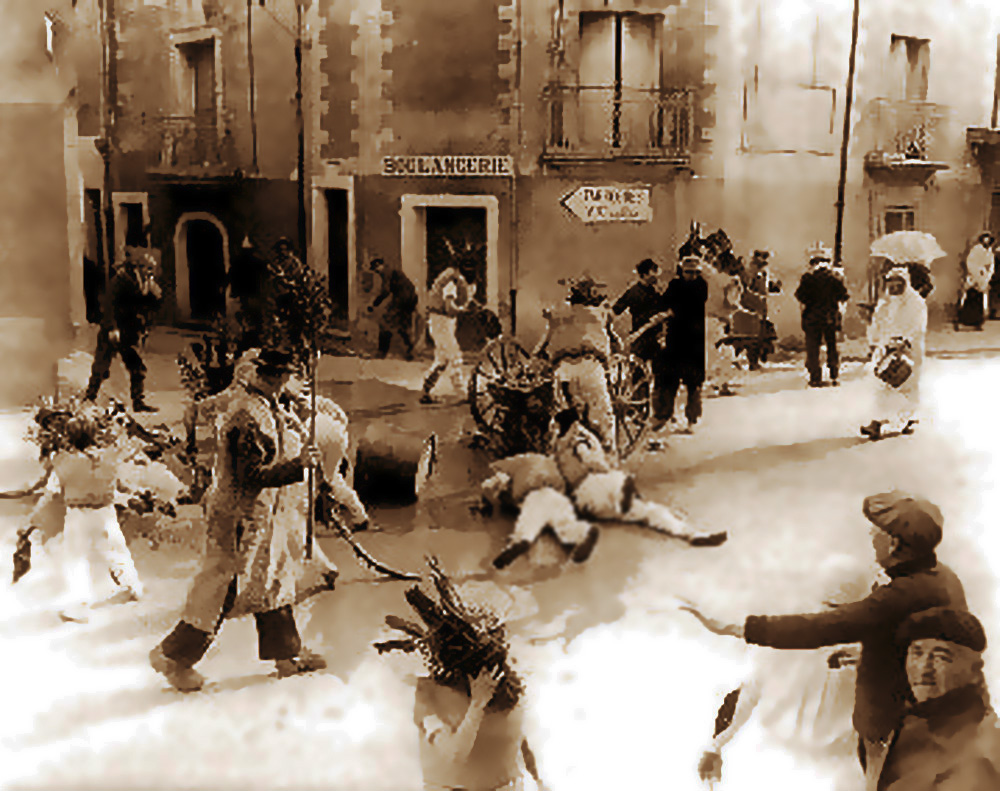 Le combat des pailhasses